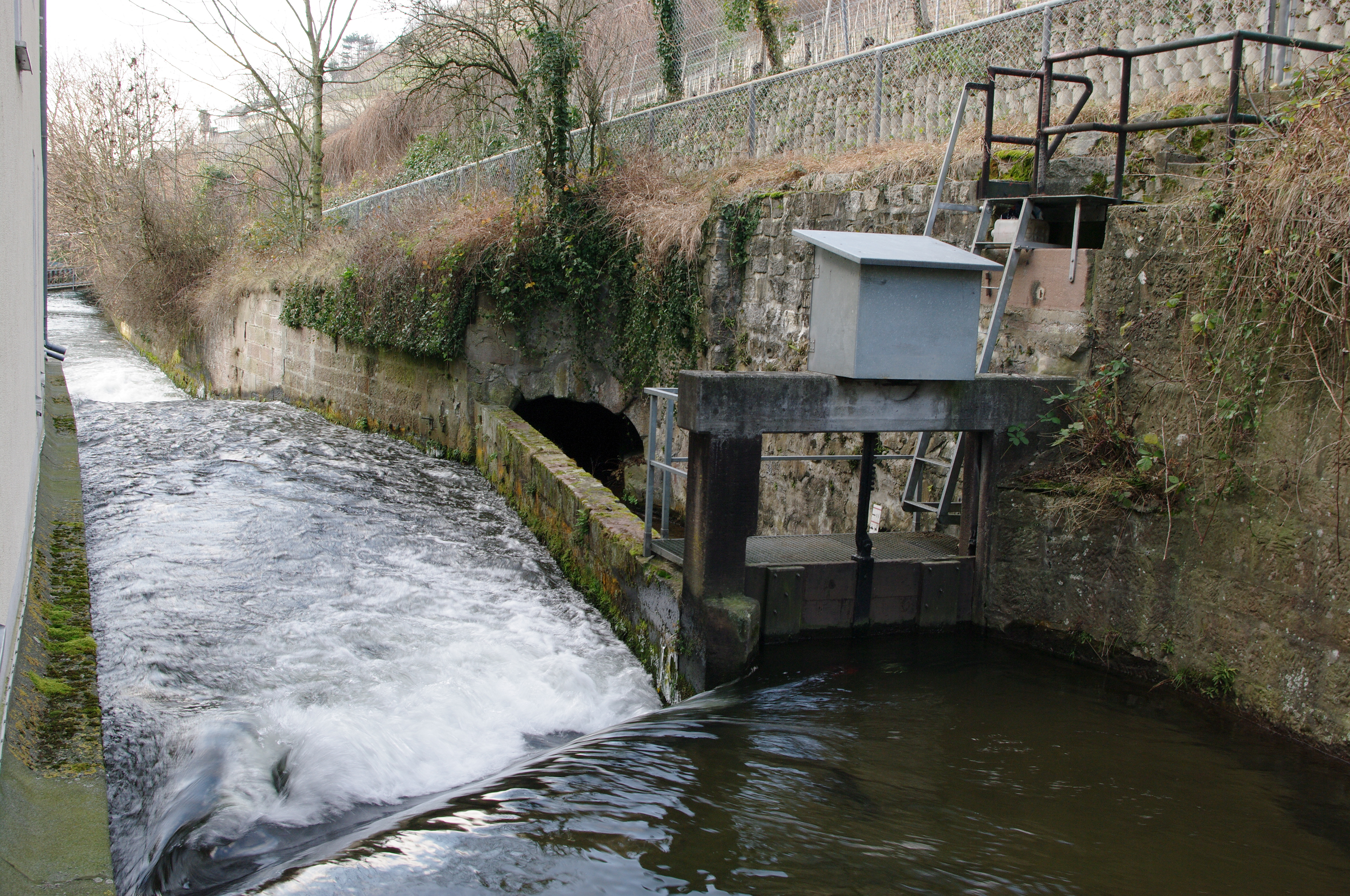 Ausleitung des Wassers für die Freiburger Bächle aus dem Gewerbekanal in einen Stollen, der dann die Bächle speist.